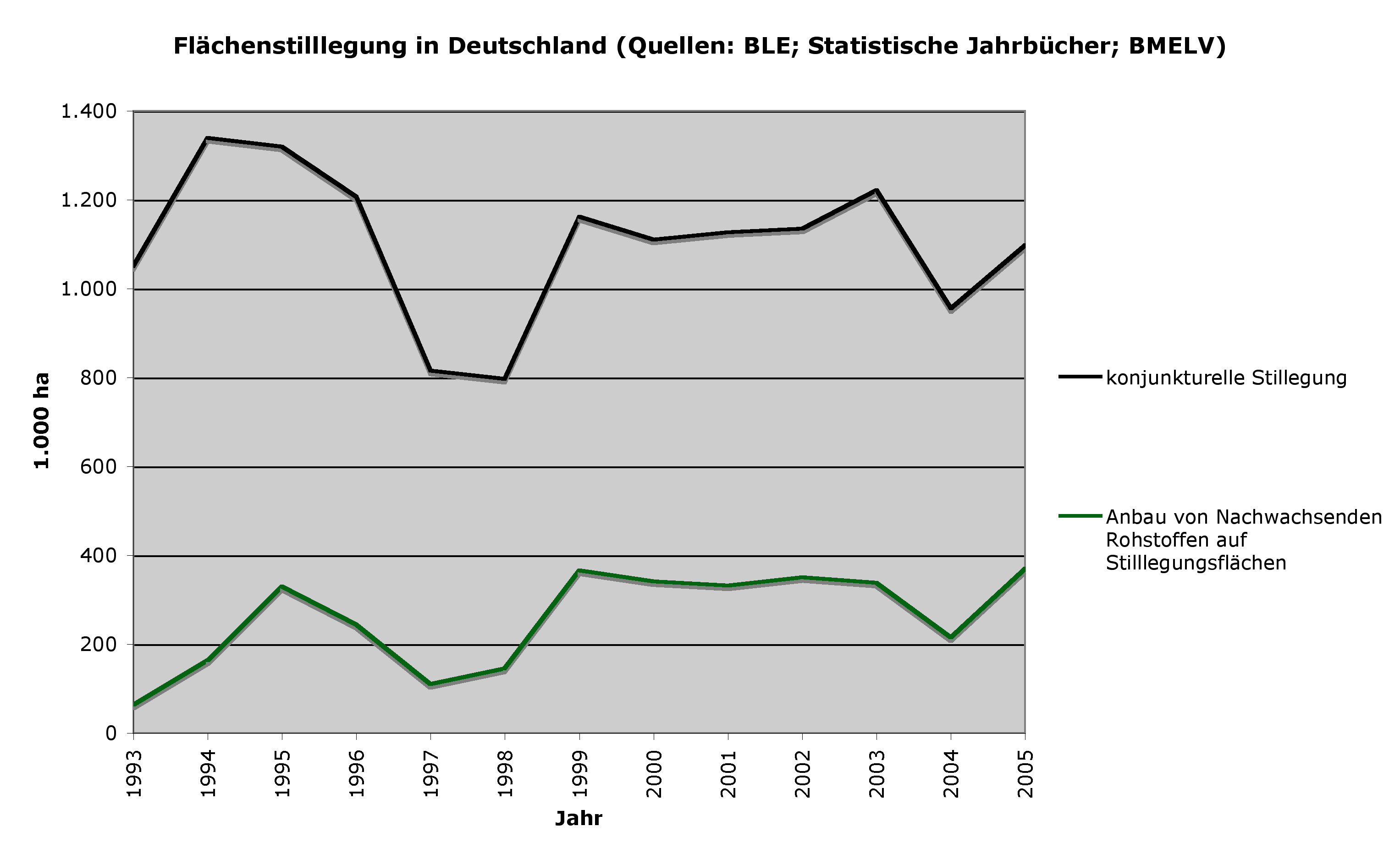 graph: Agricultural Set-Aside in Germany 1993 to 2005; Grafik: Flächenstillegung in Deutschland 1993-2005